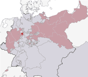 Lage des Kreises Brakel in Preußen im Jahr 1818